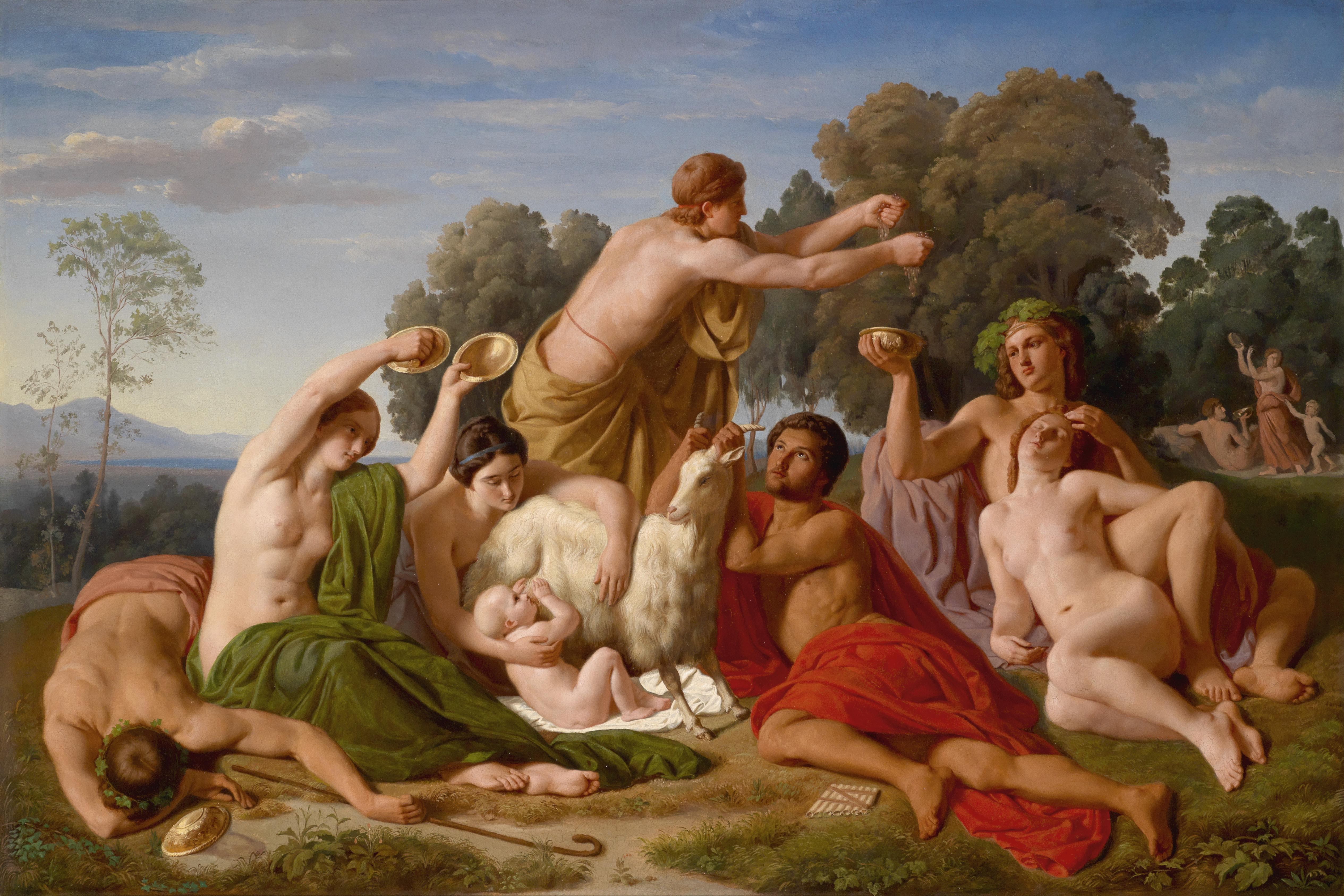 Die Erziehung des Jupiter auf dem Berge Ida auf Kreta, 1846,Öl auf Leinwand, 97 x 144 cm